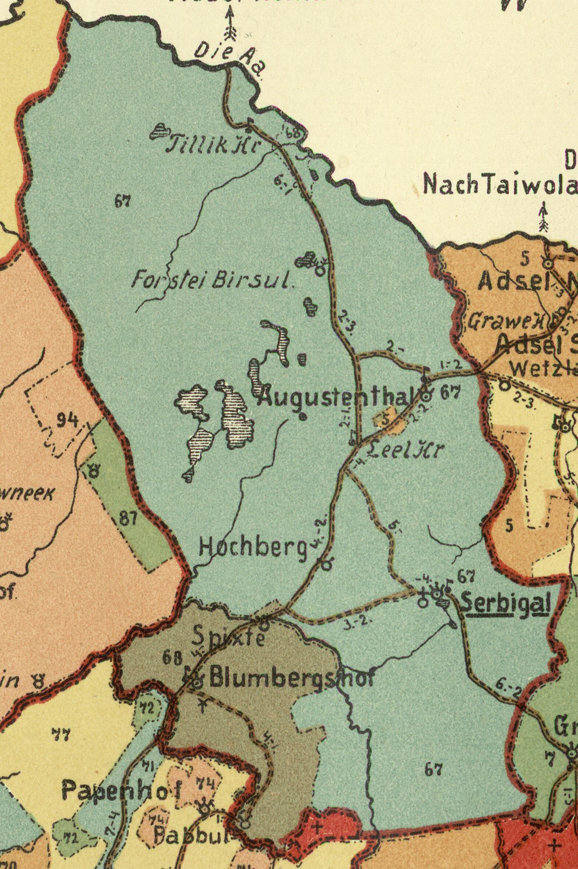 Aumeistri kihelkonna mõisad 1904. aasta kaardil.